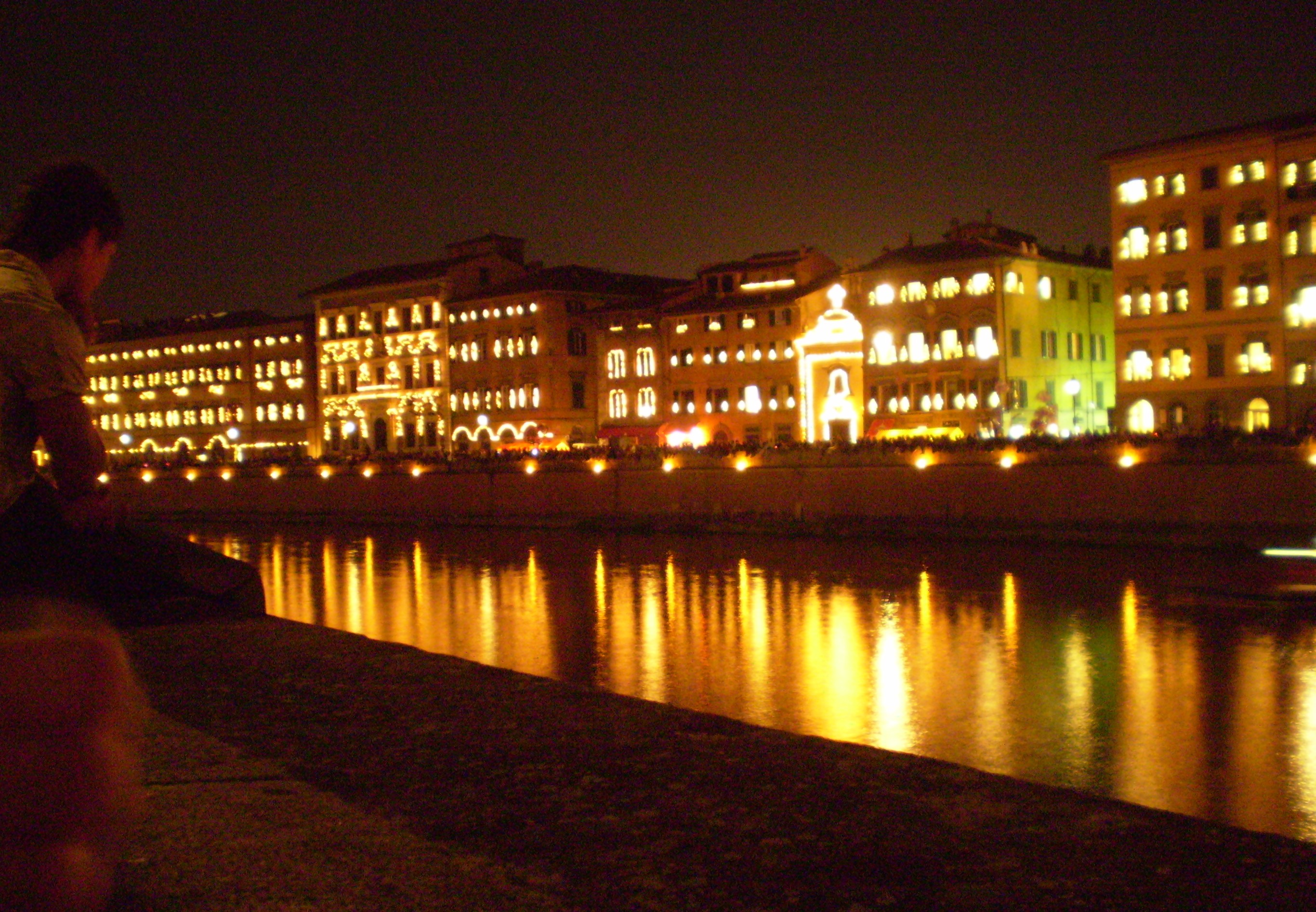 Pisa, Tuscany, Italy. Luminara 2007 - View from Lungarno Gambacorti to Lungarno Pacinotti